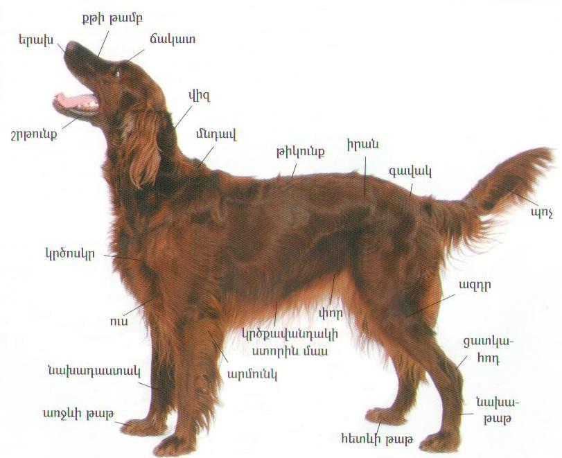 Շան մարմնի մասերը